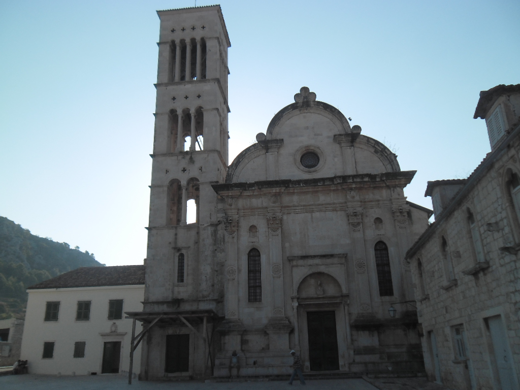 grad Hvar